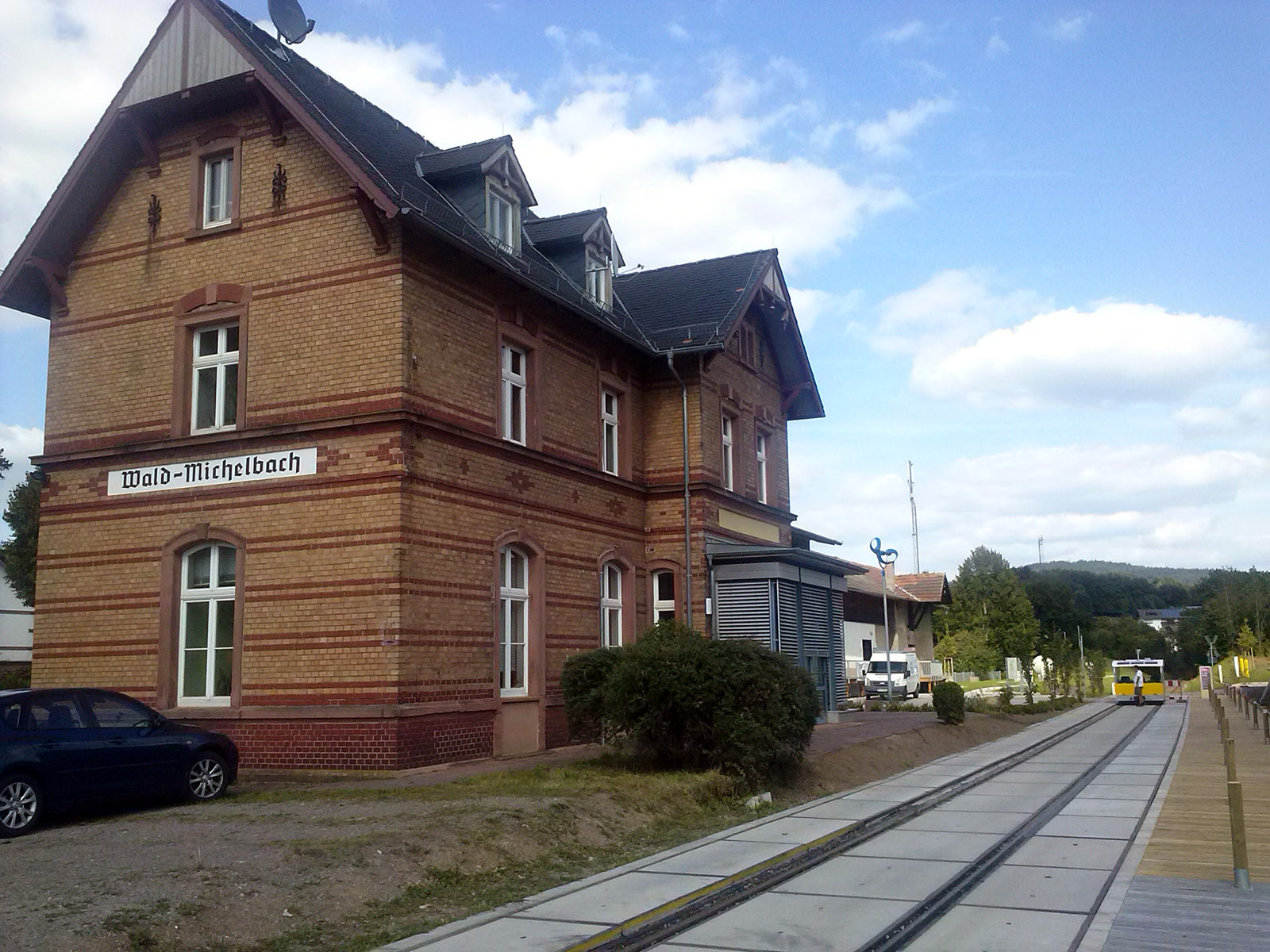 Der Bahnhof von Wald-Michelbach mit einer Solardraisine